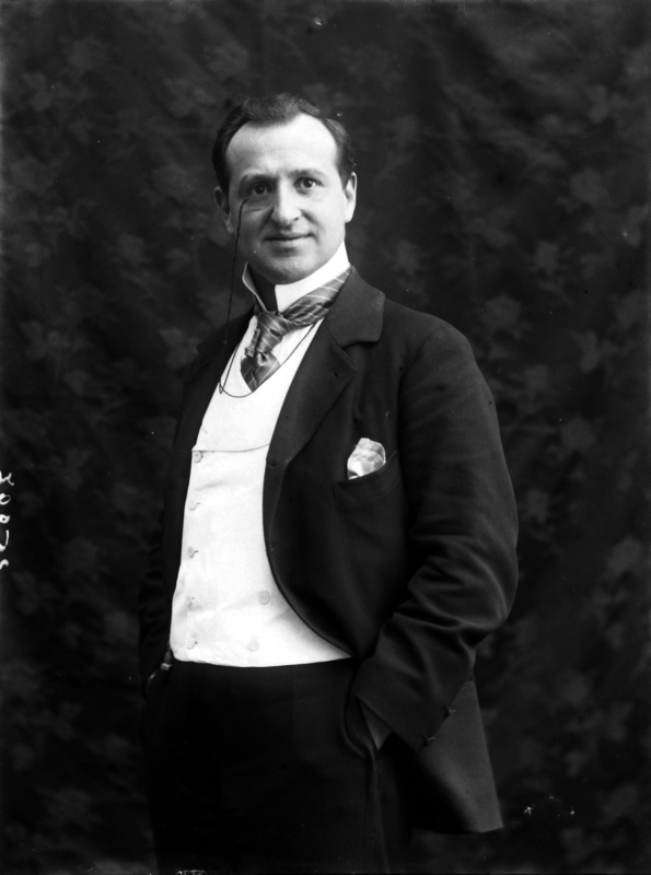 Cesare Dondini fotografato da Mario Nunes Vais